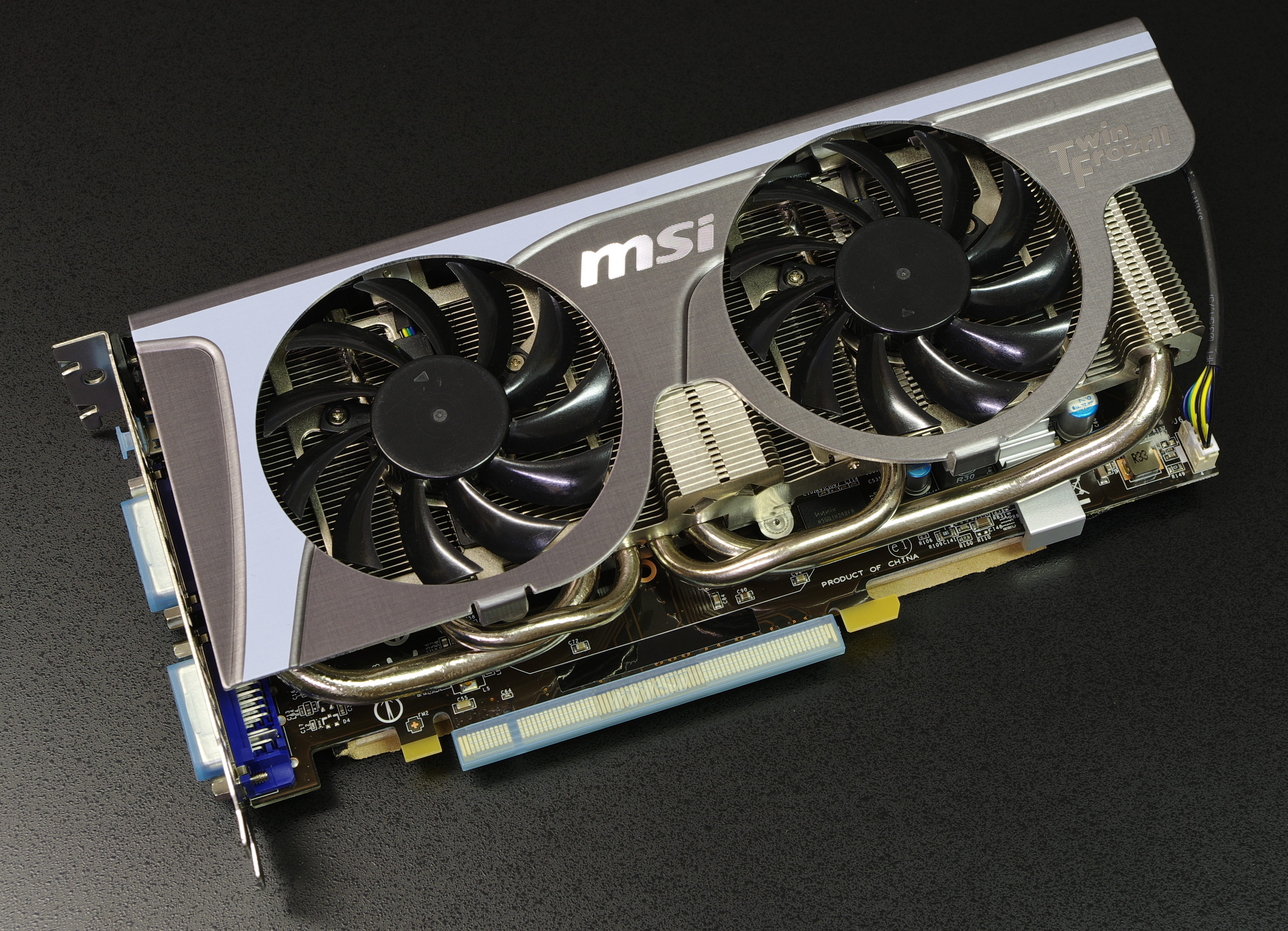 MSI N560GTX-Ti Twin Frozr II/OC